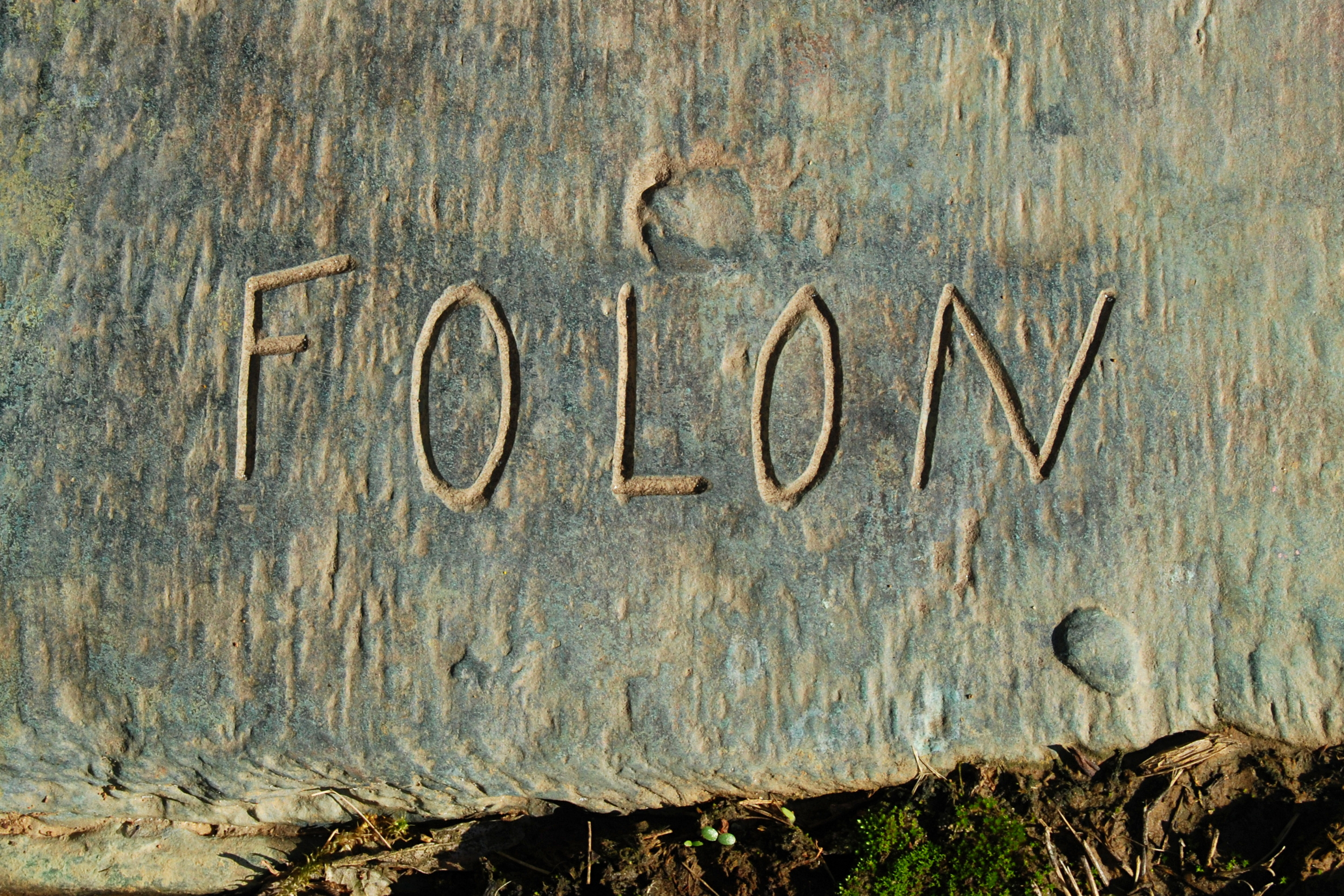 Belgique - Brabant wallon - Collines de Wavre - Jean-Michel Folon - Quelqu'un - 2001